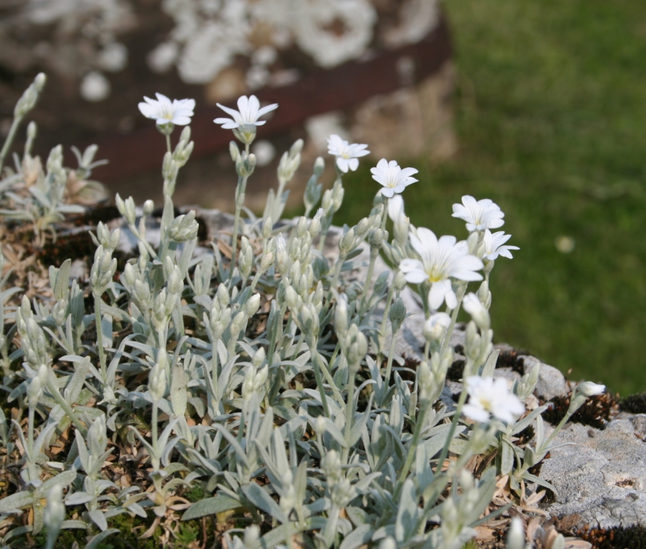 Cerastium_tomentosum (Cerastio tomentoso)